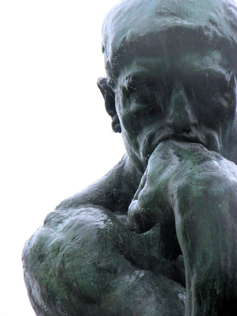 Le Penseur, Musée Rodin, Paris